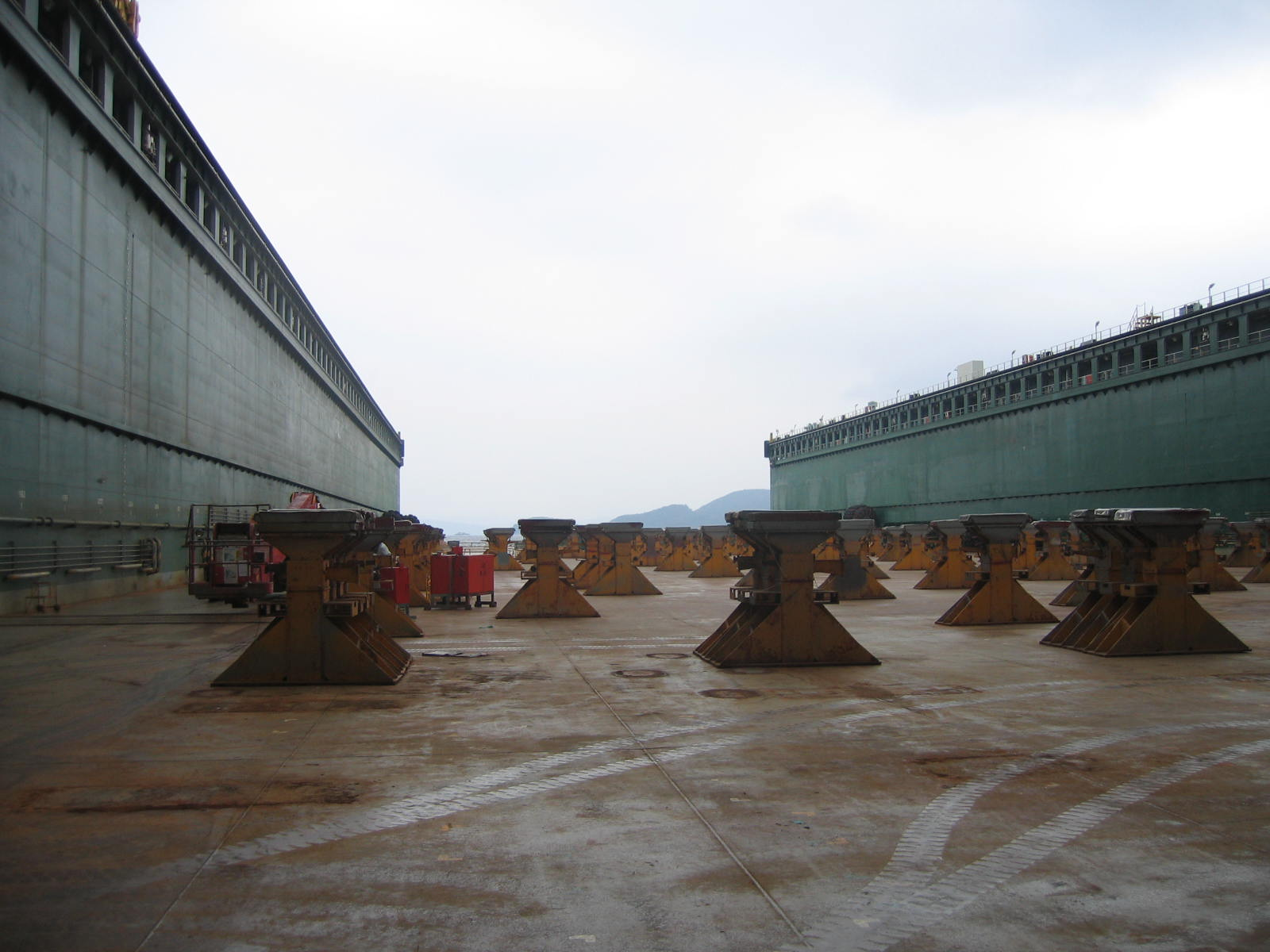 Док G2 судоверфи SAMSUNG, Ю.Корея.